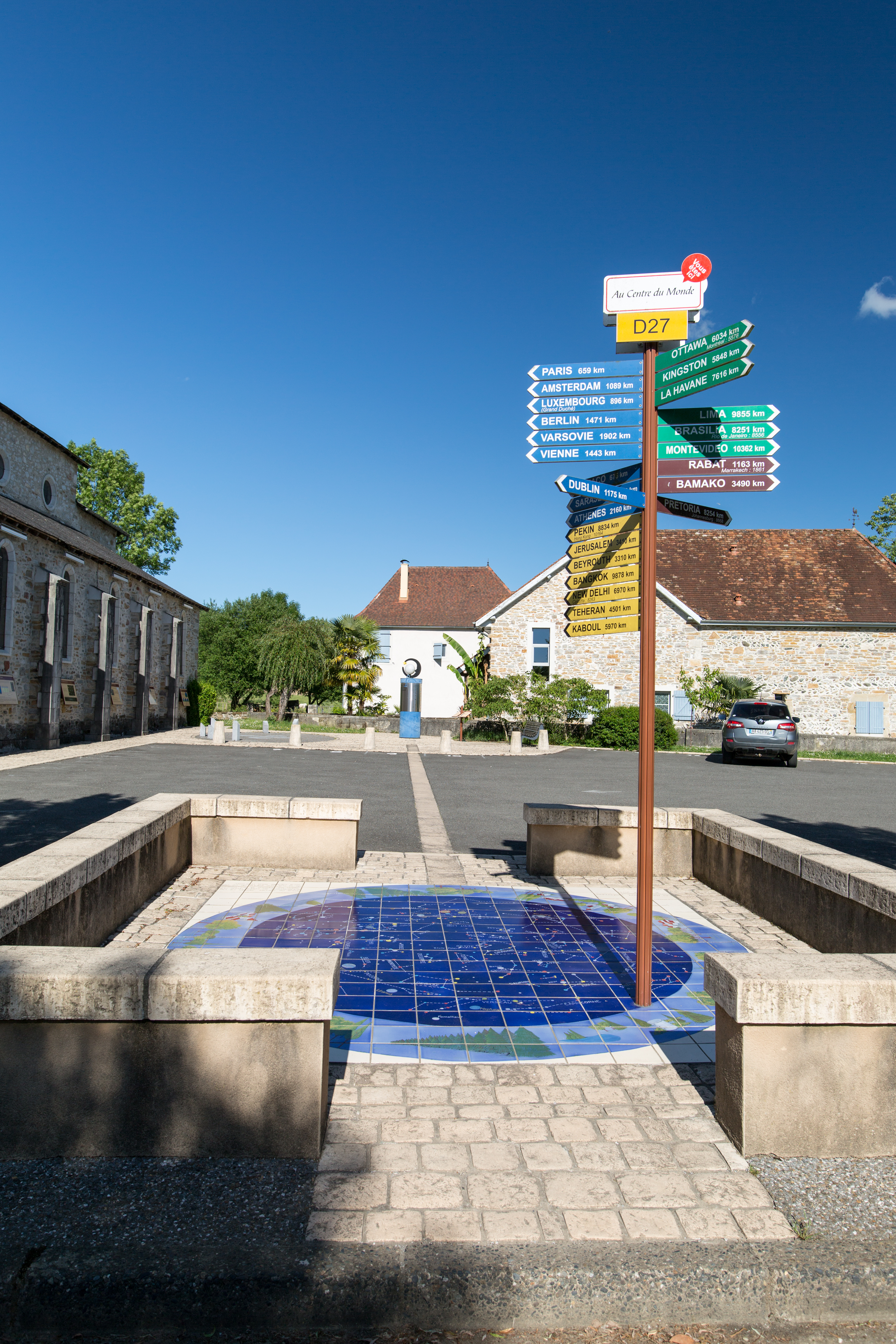 Centre du monde de Laàs.